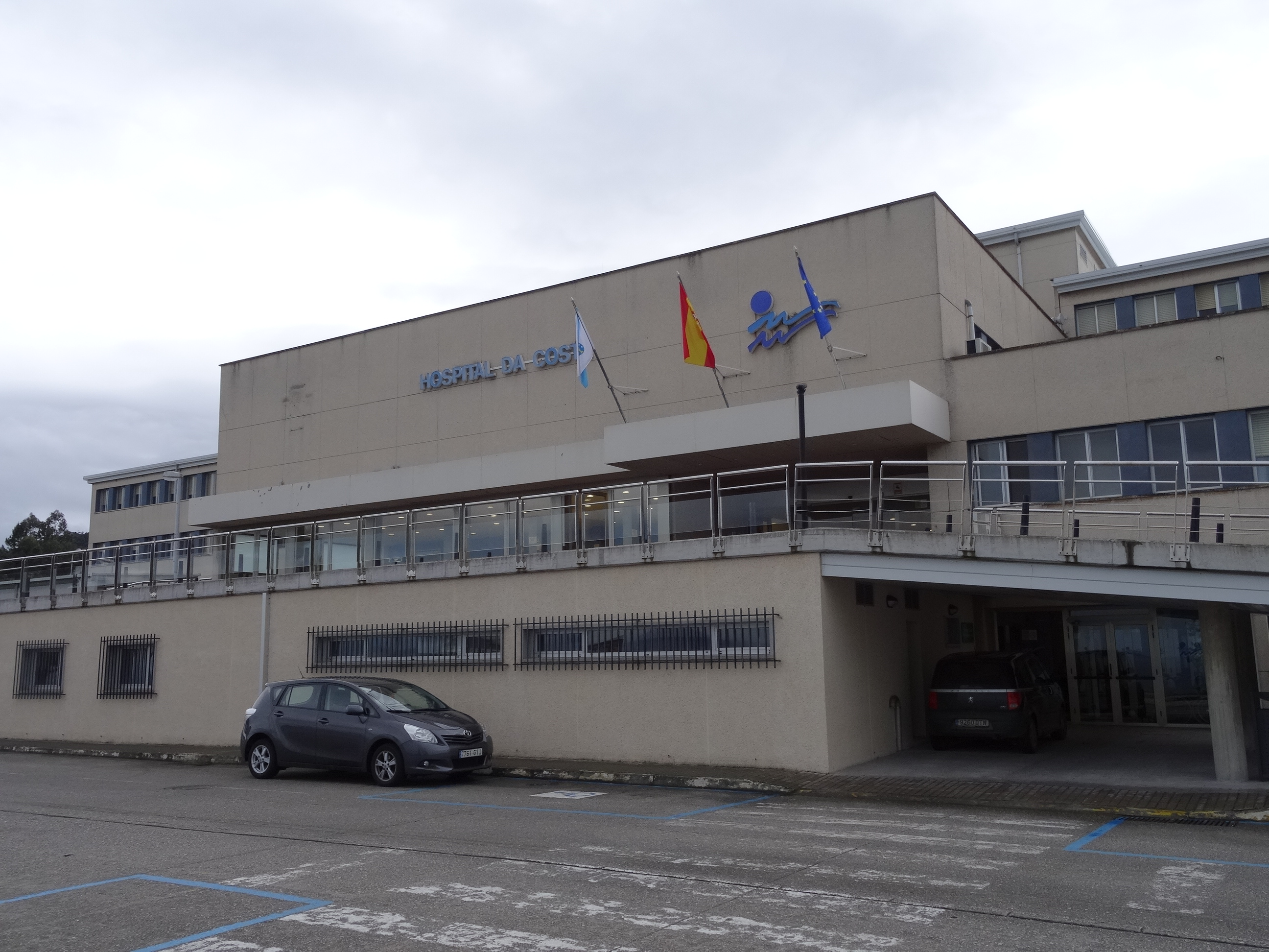 Hospital da Costa en Burela.